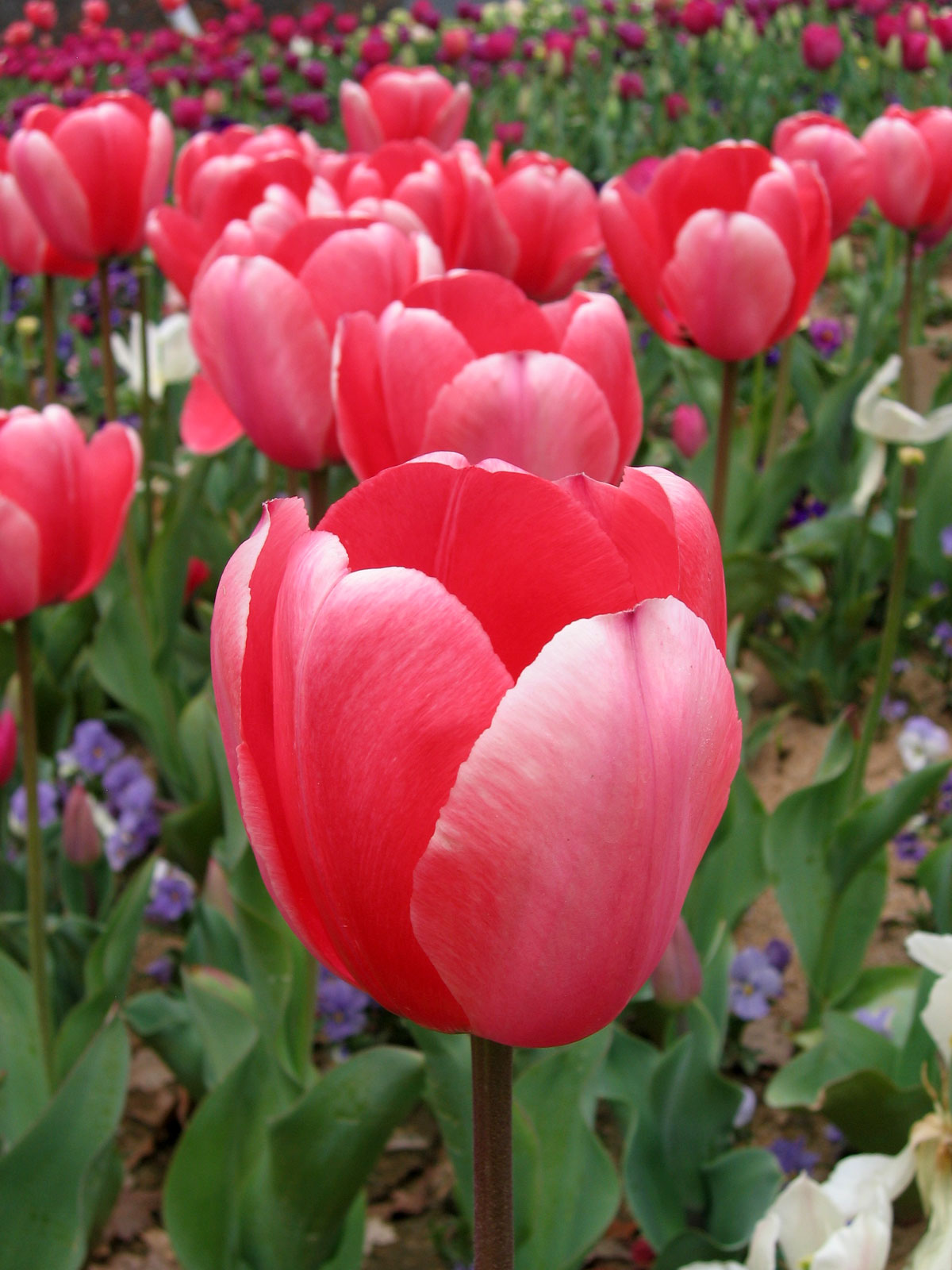 Tulip, 2005 Floriade, Canberra